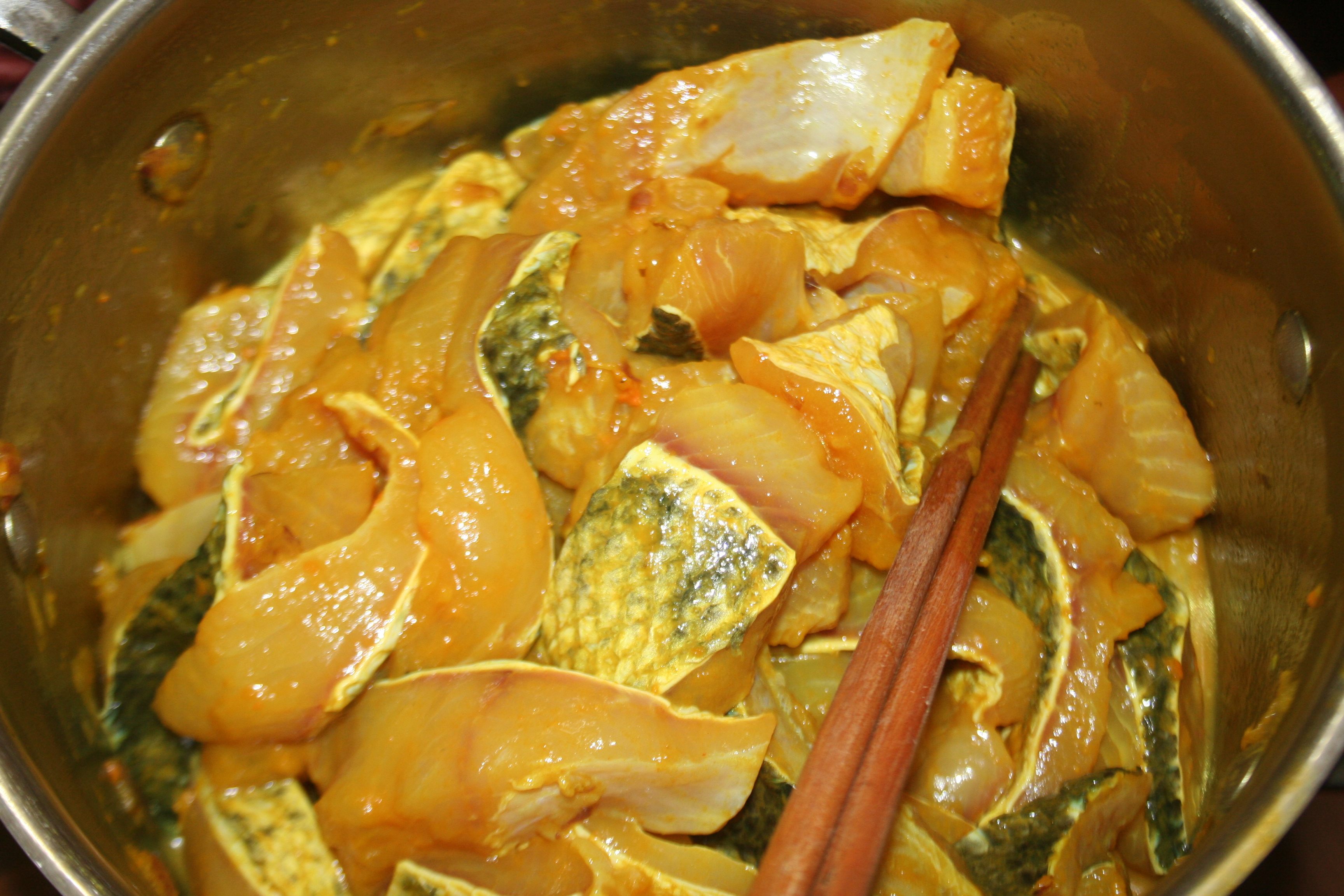 Thịt cá quả sơ chế và tẩm ướp riềng, mẻ, mắm tôm, nghệ phục vụ cho món chả cá Người thực hiện:Khương Việt Hà